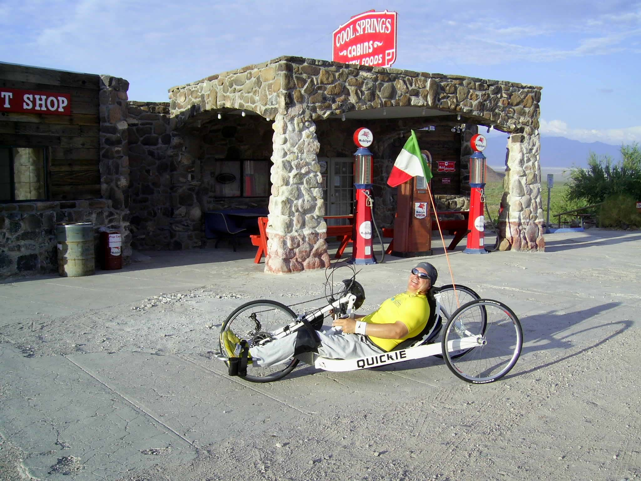 Norberto De Angelis durante l'attraversata della Route 66